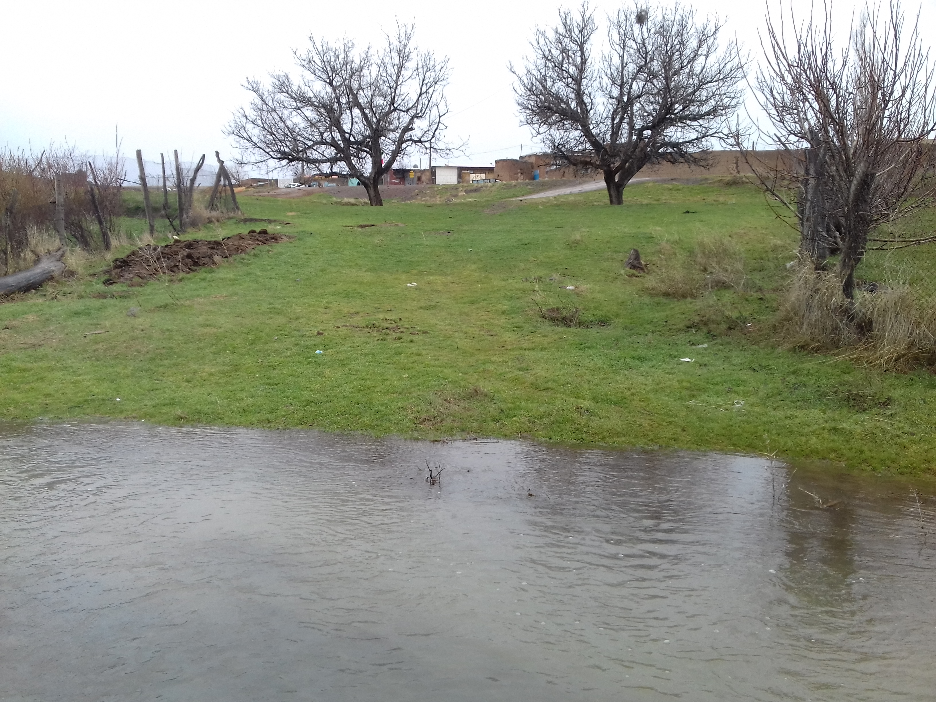 طغیان رودخانه فصلی و طبعیت روستای حسن آباد